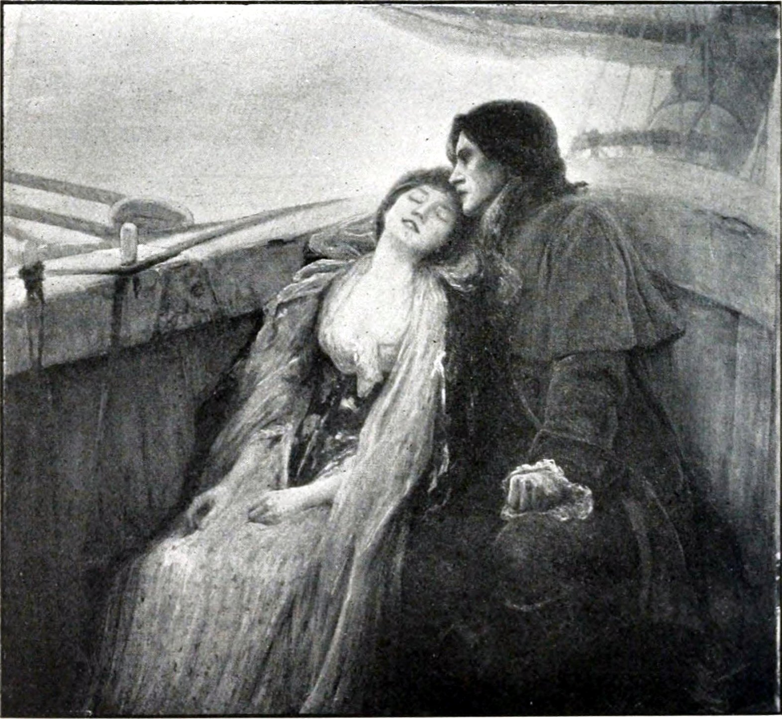 Manon